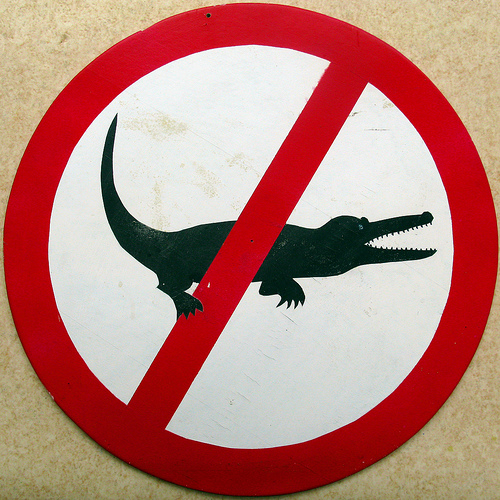 Ne krokodilu.